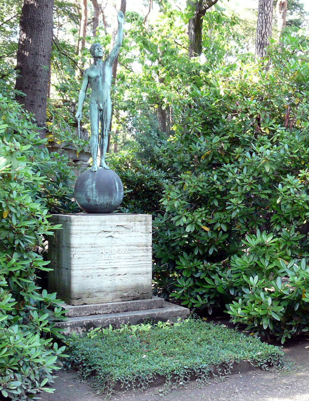 Grab von Max Immelmann auf dem Urnenhain in Dresden-Tolkewitz, Entwurf von Peter Pöppelmann